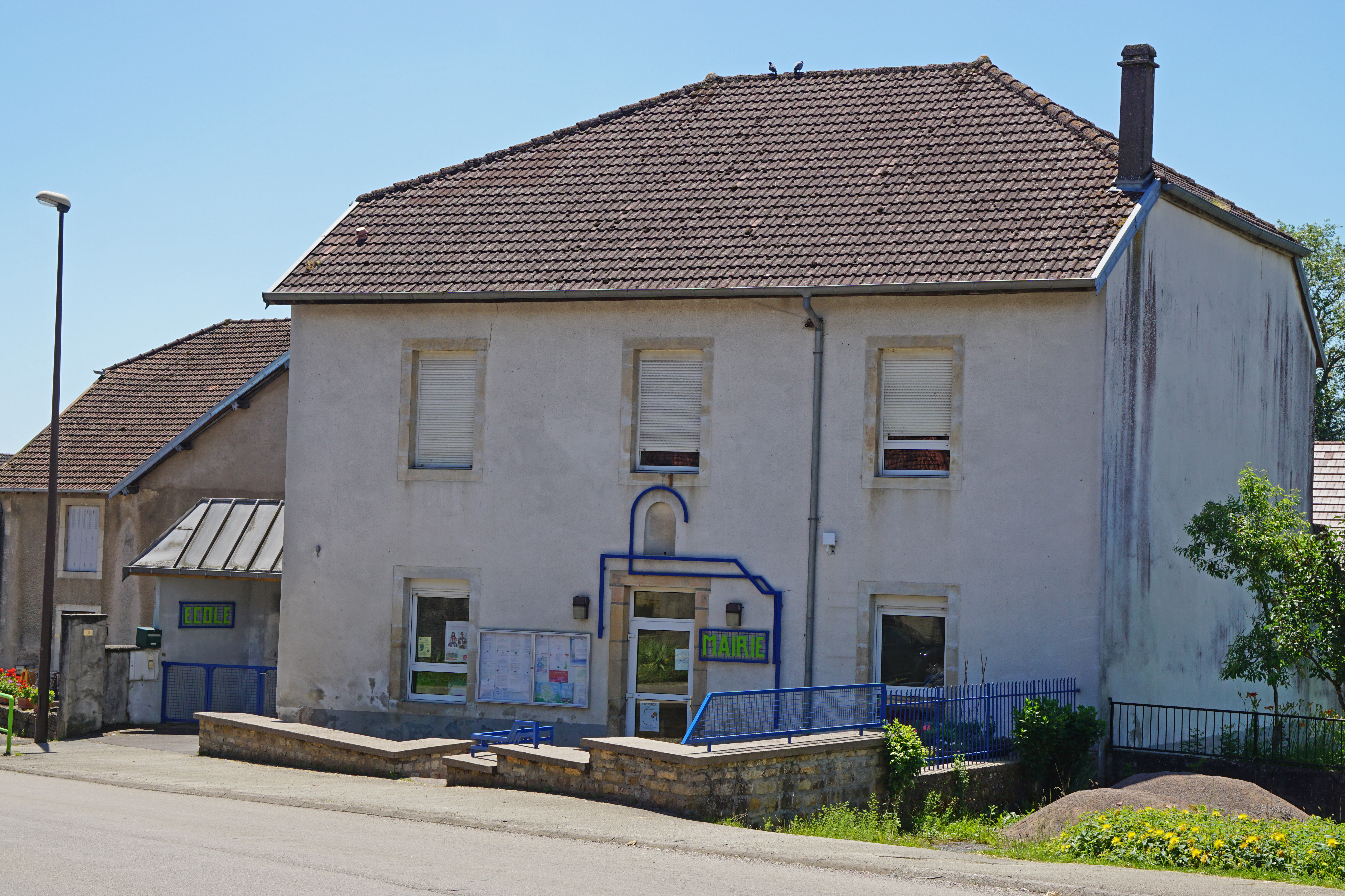 Mairie de Flagy.